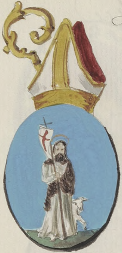 Na niebieskim tle Jan Chrzciciel. Odziany w srebrną szatę. Przykryty brązową skórą. Z tyłu stoi baranek